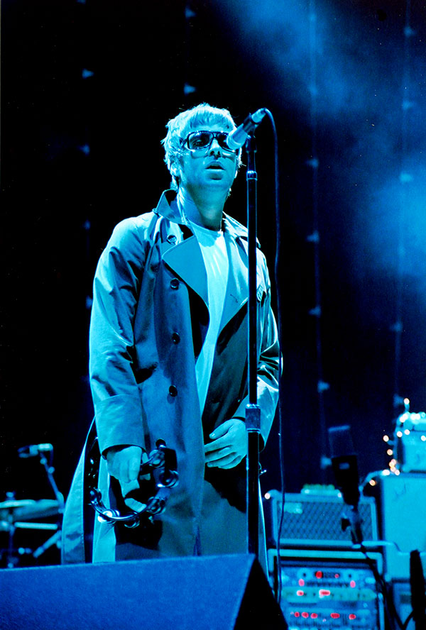 Liam Gallagher (San Ysidro, CA. 2005.)